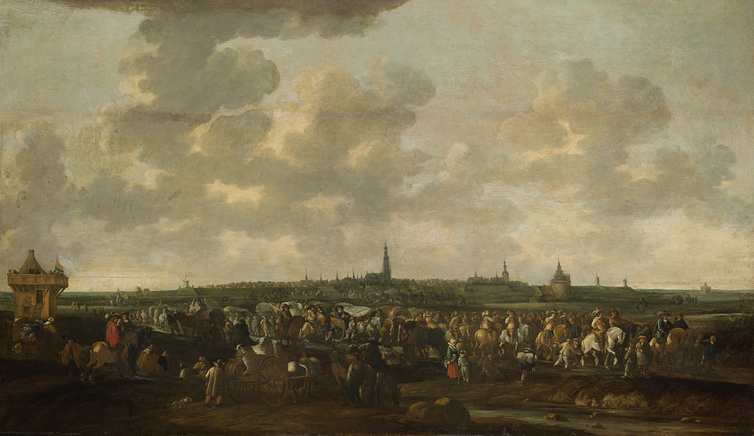 Het vertrek van de Spaanse troepen uit Breda, 10 oktober 1637. Van links naar rechts trekt een lange stoet van soldaten, ruiters en wagens. Langs de kant van de weg staan toeschouwers. In de verte het profiel van de stad Breda.